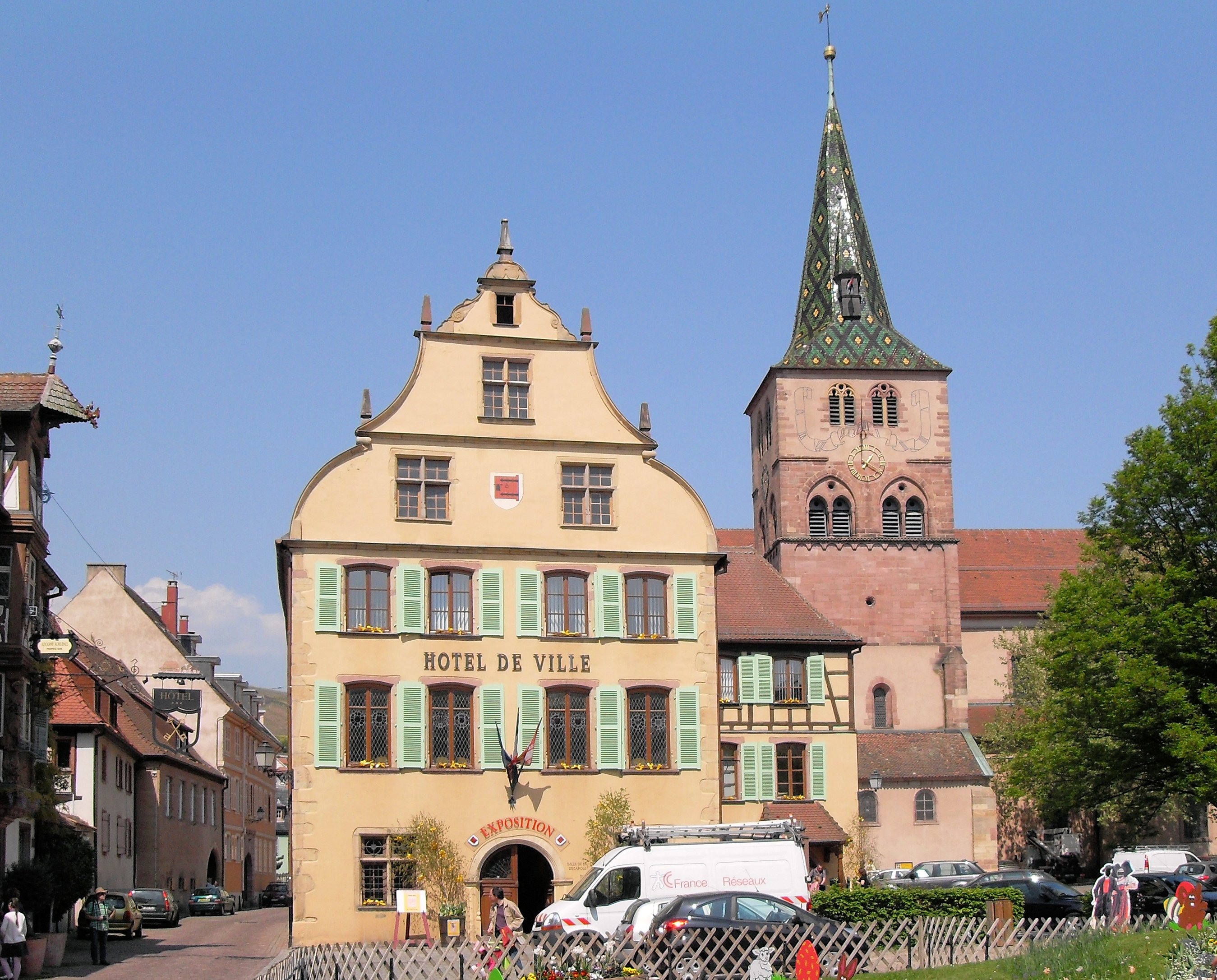 L'hôtel de ville de Turckheim